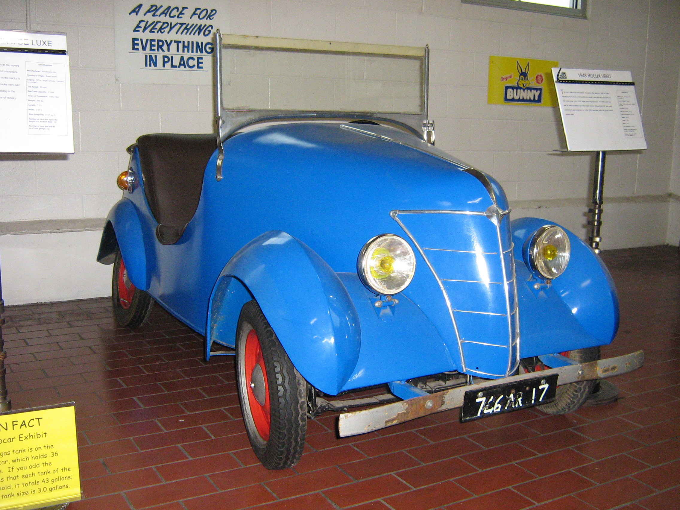 1948 Rolux